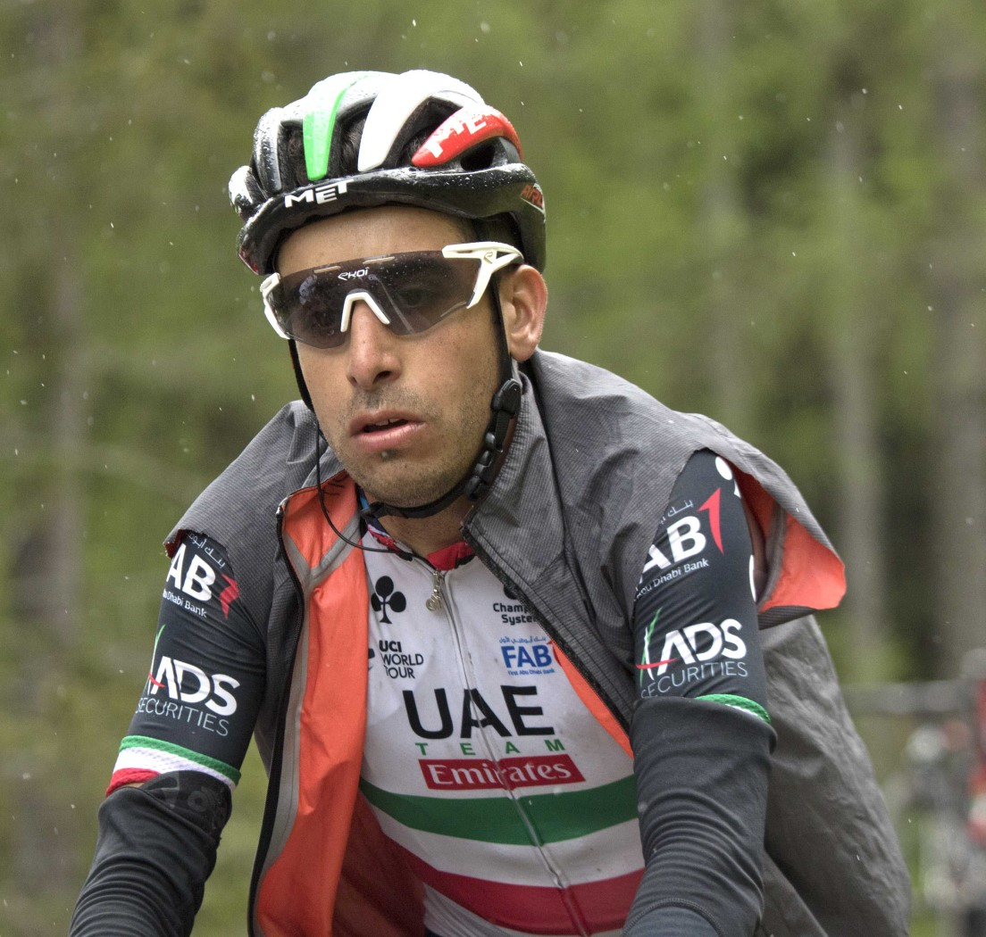 GIR20135 aru